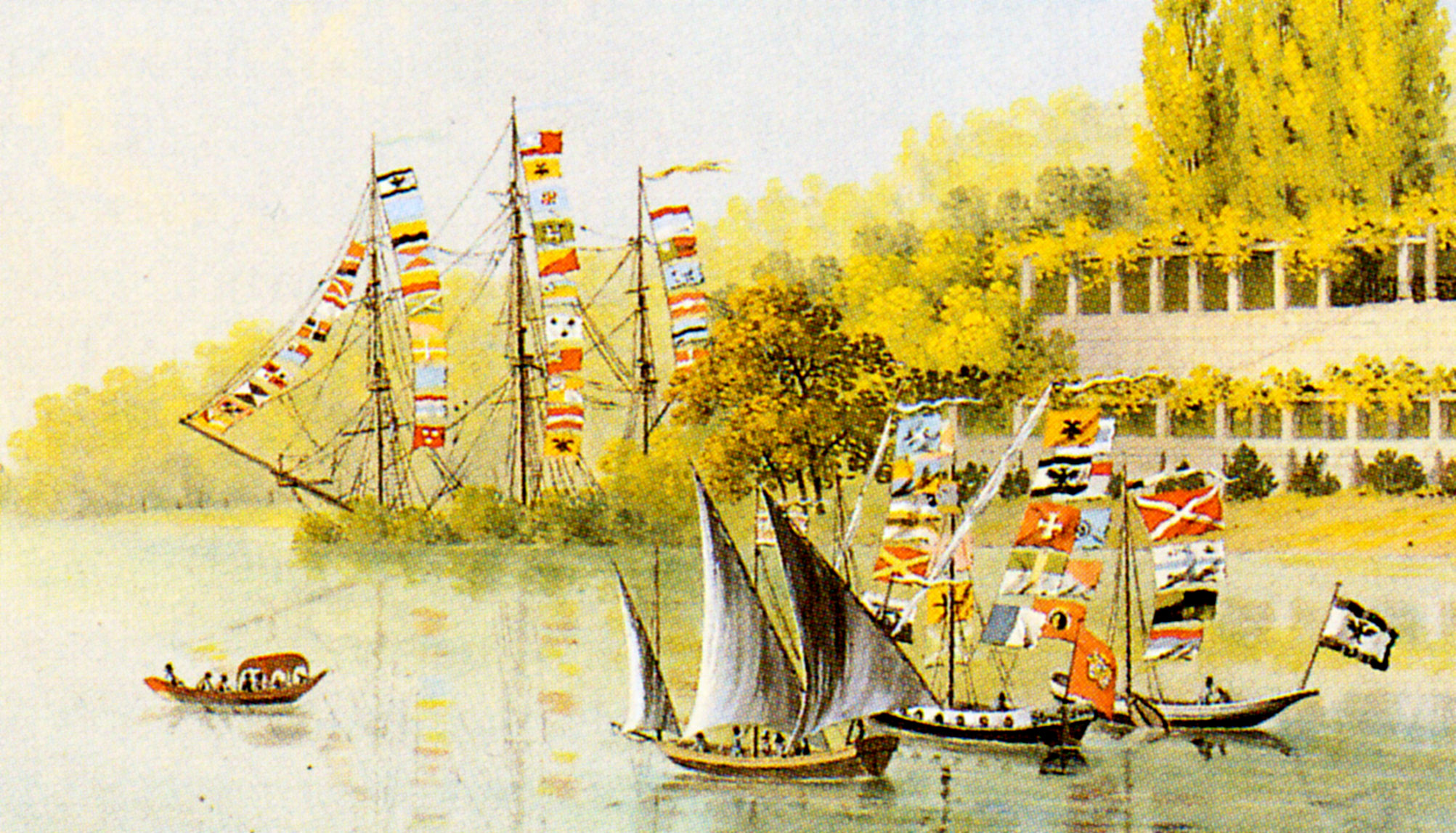 J. H. Bleuler, Jungfernsee mit Casino in Klein-Glienicke, Ölgemälde 1830 (SPSG Potsdam)